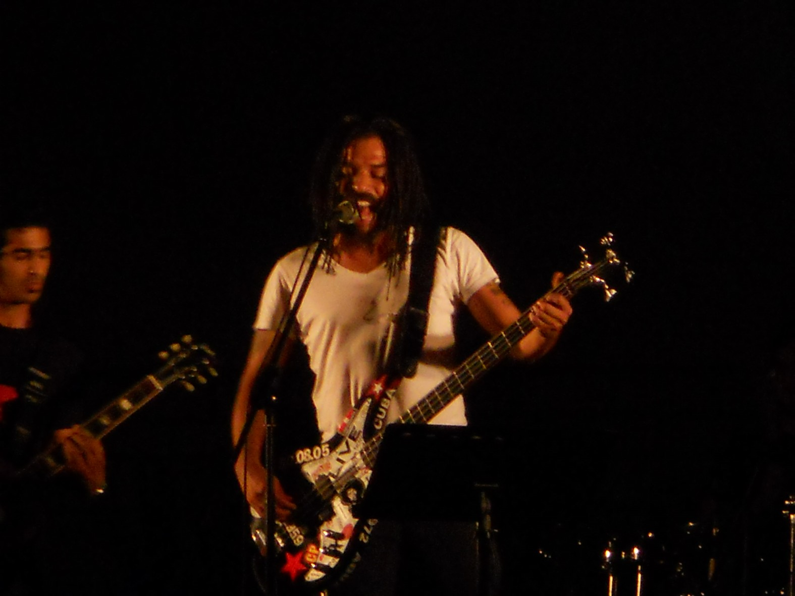 X-Alfonso en concierto en UCLV